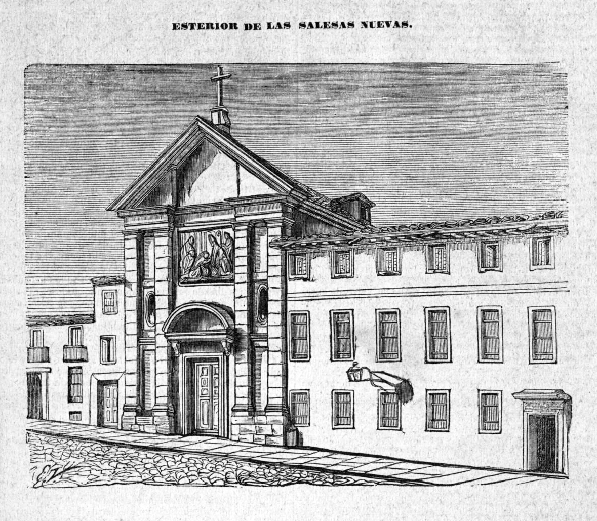 Salesas Nuevas (Madrid).